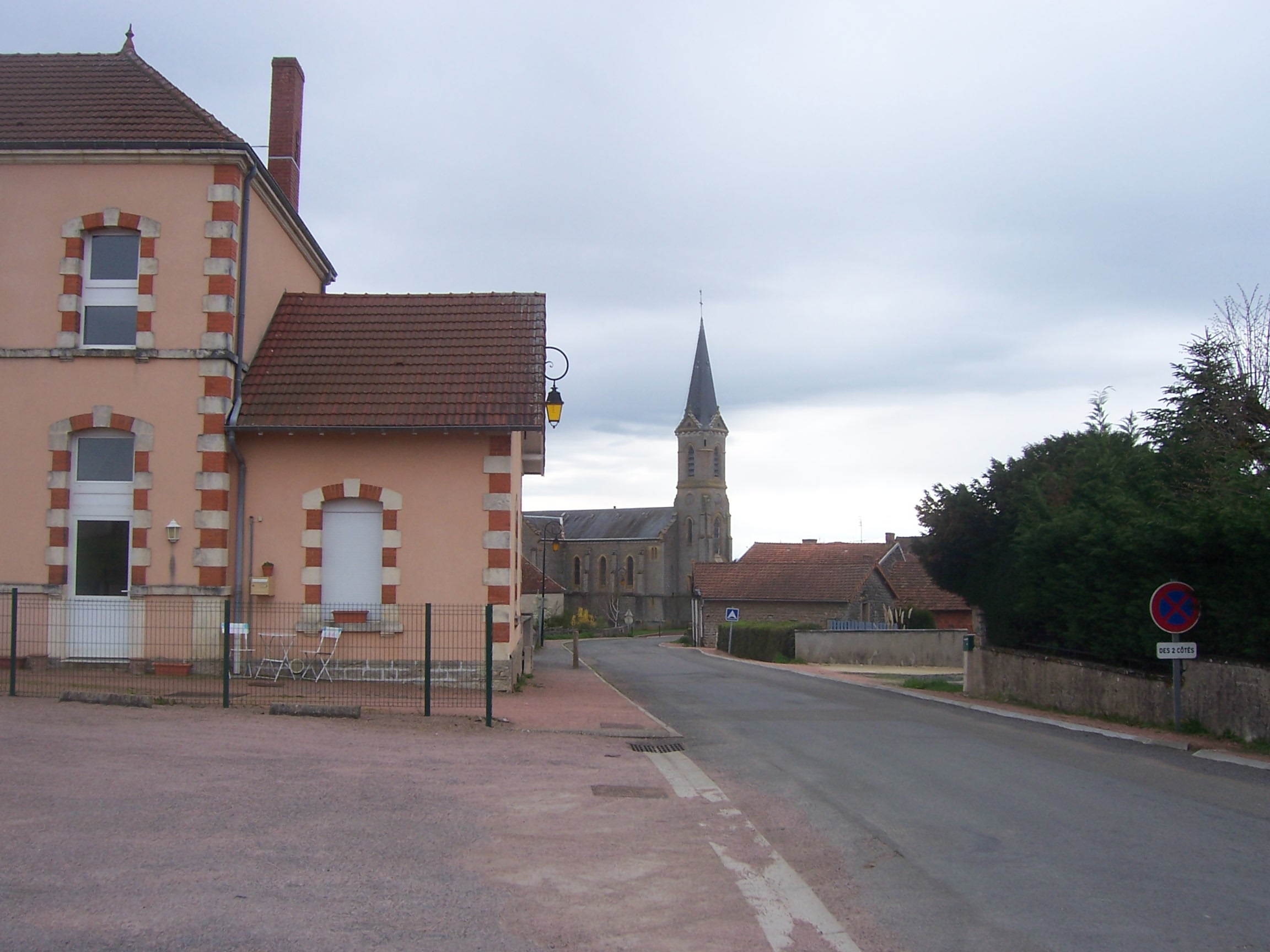 Oudry